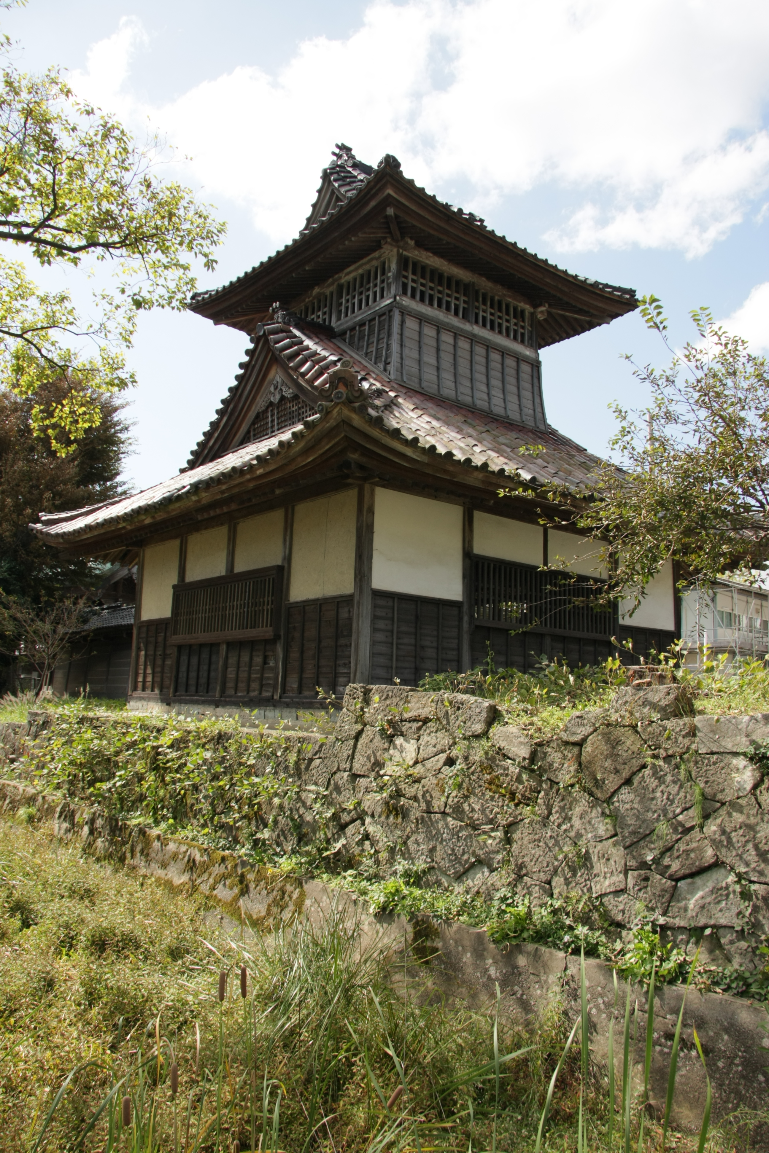 勝興寺の鼓堂